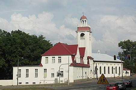 Kościół NMP Królowej Polski przy ul. 1 Maja w Słubicach